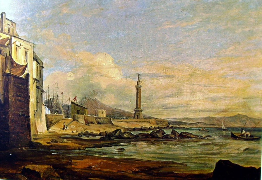 Napoli: la Lanterna del Molo